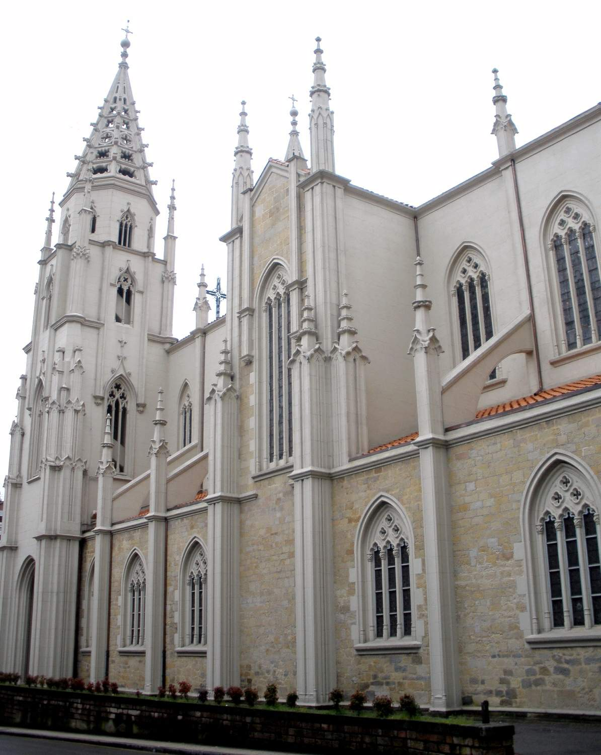 Sama (Langreo) - Iglesia de Santiago Apóstol